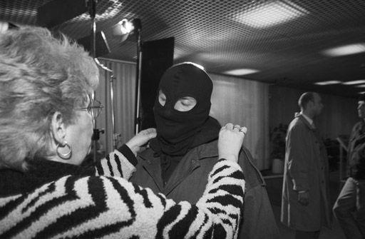 Blick #21. Fotozyklus Augenblicke